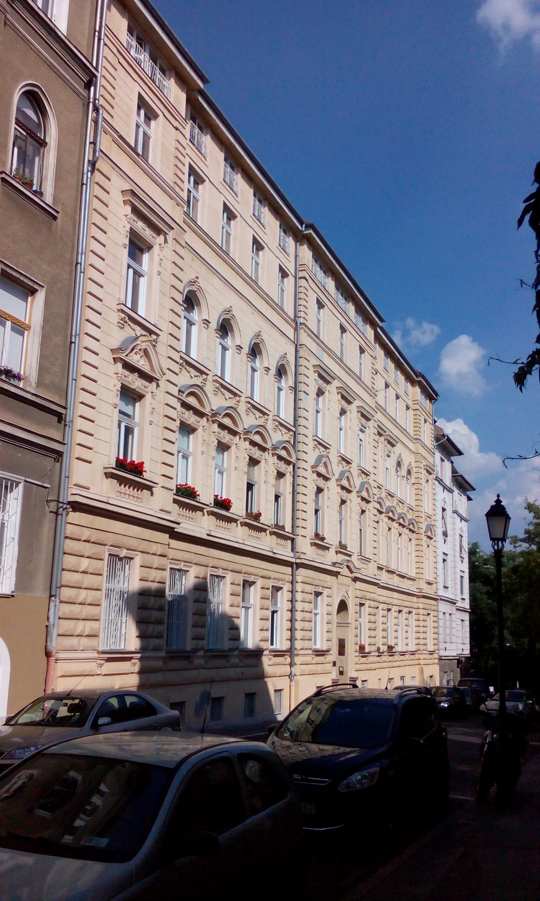 Будинок на вулиці Логоді в Будапешті, де з 1916 р. знаходилась редакція газети Ukránia.